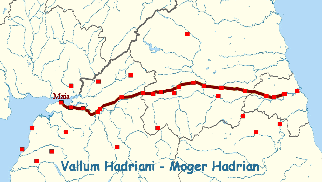 Maia - Bowness-on-Solway